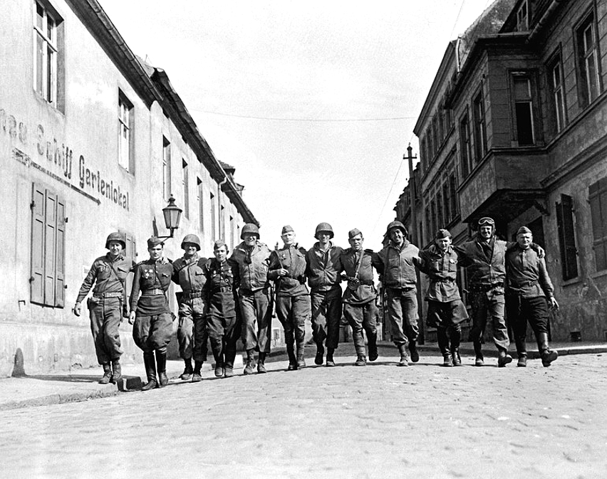 Title: Torgau, Begegnung amerikanische-sowjetische Soldaten Factual corrections and alternative descriptions are encouraged separately from the original description. Additionally errors can be reported at this page to inform the Bundesarchiv. Original historic description: ADN-ZB/Repro/ Torgau: Historische Begegnung Der erste direkte Kontakt zwischen den bereits auf deutschen Boden kämpfenden Armeen der UdSSR und der USA fand am 25. April 1945 bei Torgau an der Elbe statt. Unser Foto entstand einen Tag später und zeigt amerikanische und sowjetische Soldaten in den Straßen von Torgau. Reproduktion eines Fotos von Jack Connon (Signal Corps Photo).